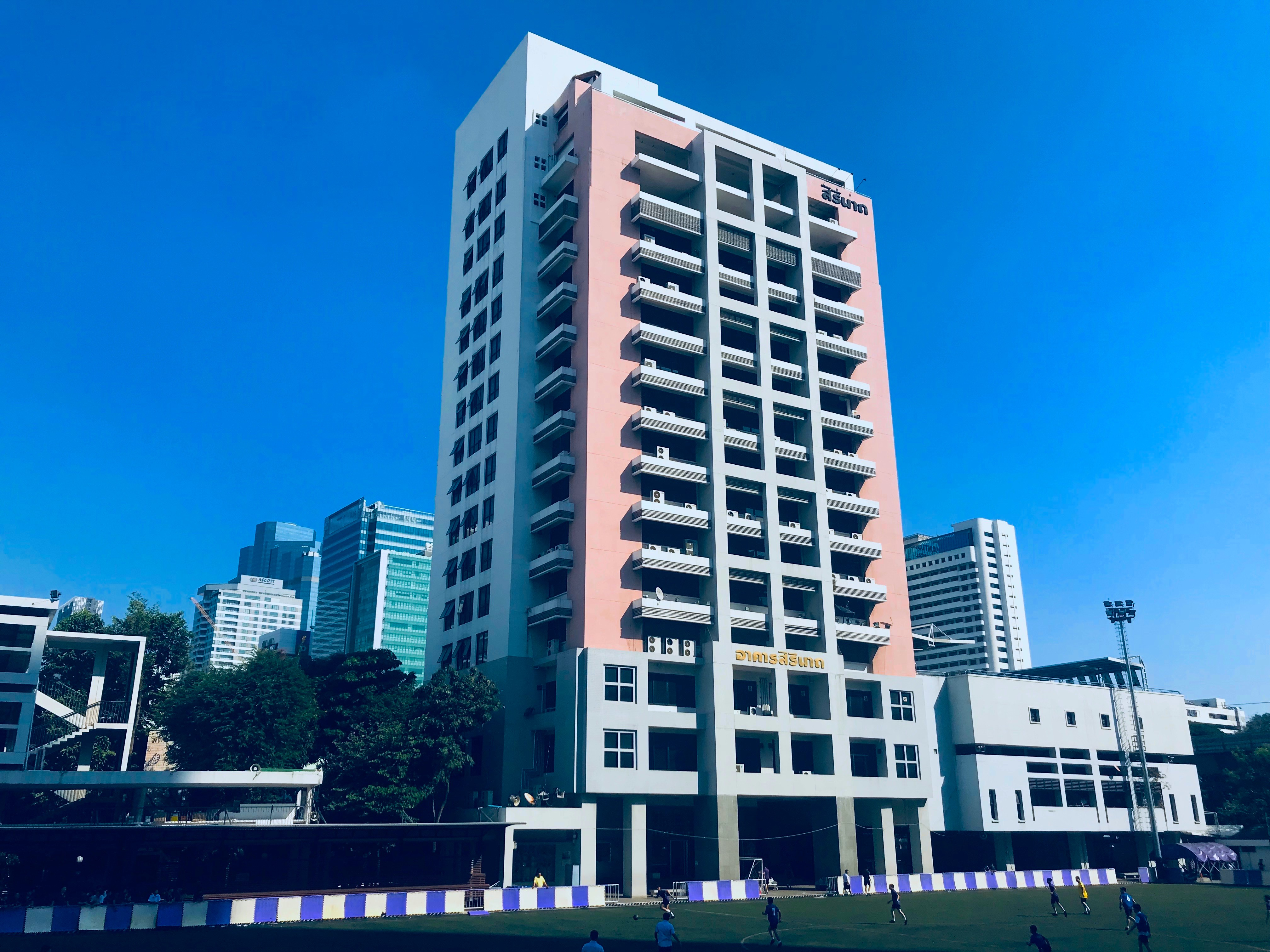 อาคารสิรินาถ โรงเรียนกรุงเทพคริสเตียนวิทยาลัย ถูกถ่ายเมื่อวันที่ 6 มกราคม 2563 ซึ่งโรงเรียนมีอายุ 167 ปี